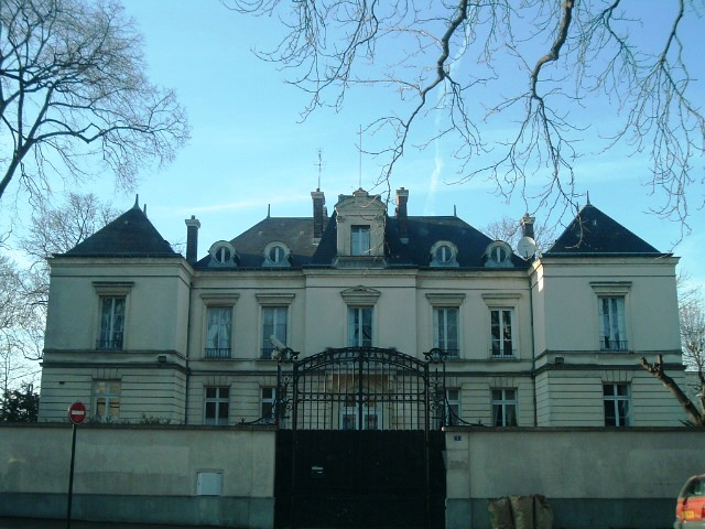 Sous-préfecture de Corbeil-Essonnes (91)